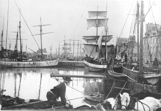 Le port de Paimpol vers 1895, pendant le temps de la pêche (paimpolaise) de morue à Islande: "vers 1895 plus de 80 goélettes hivernent dans le port" (description de l'image au page web du Musée de la Mer à Paimpol)